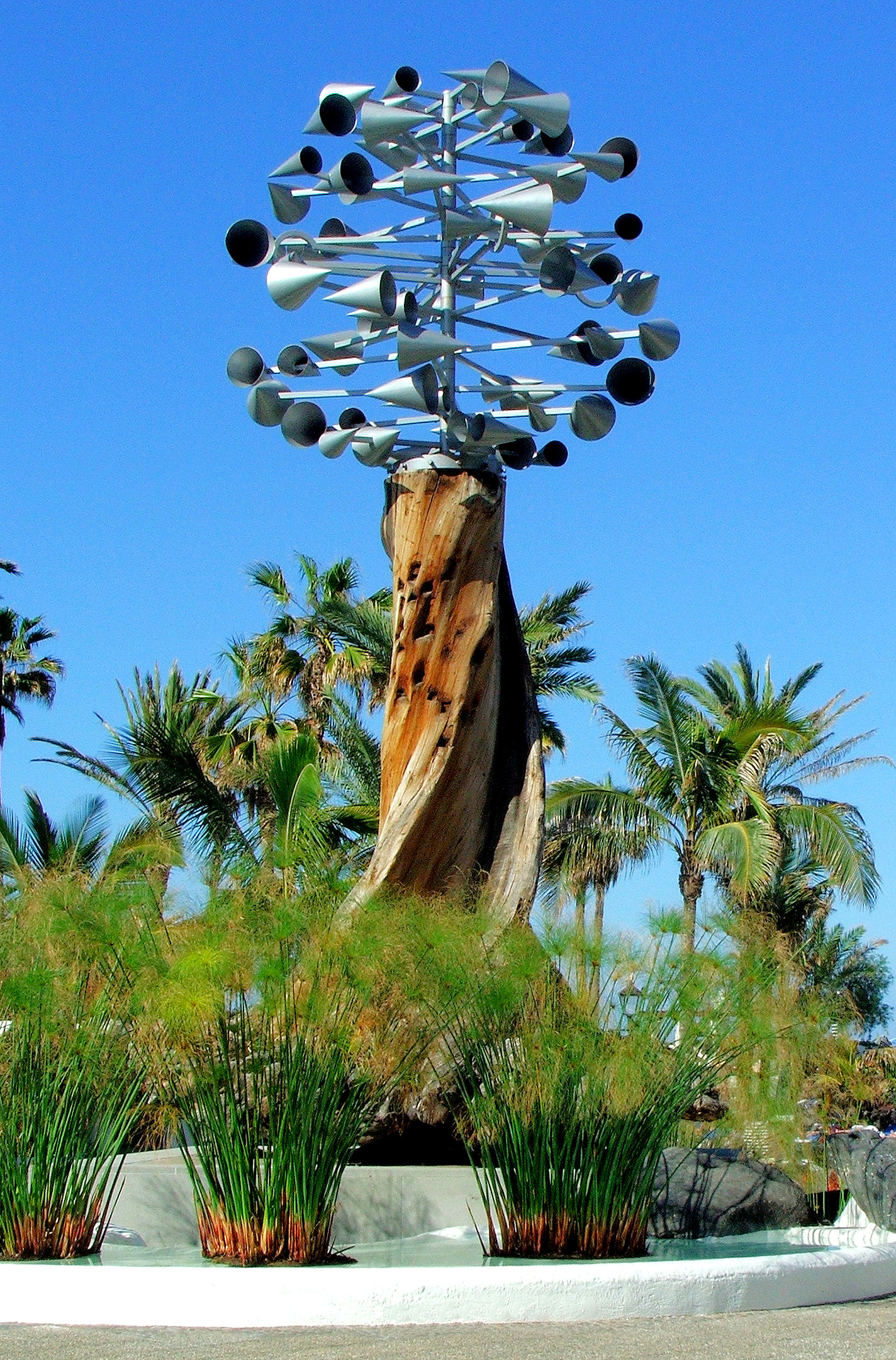 Escultura Barlovento (1977)